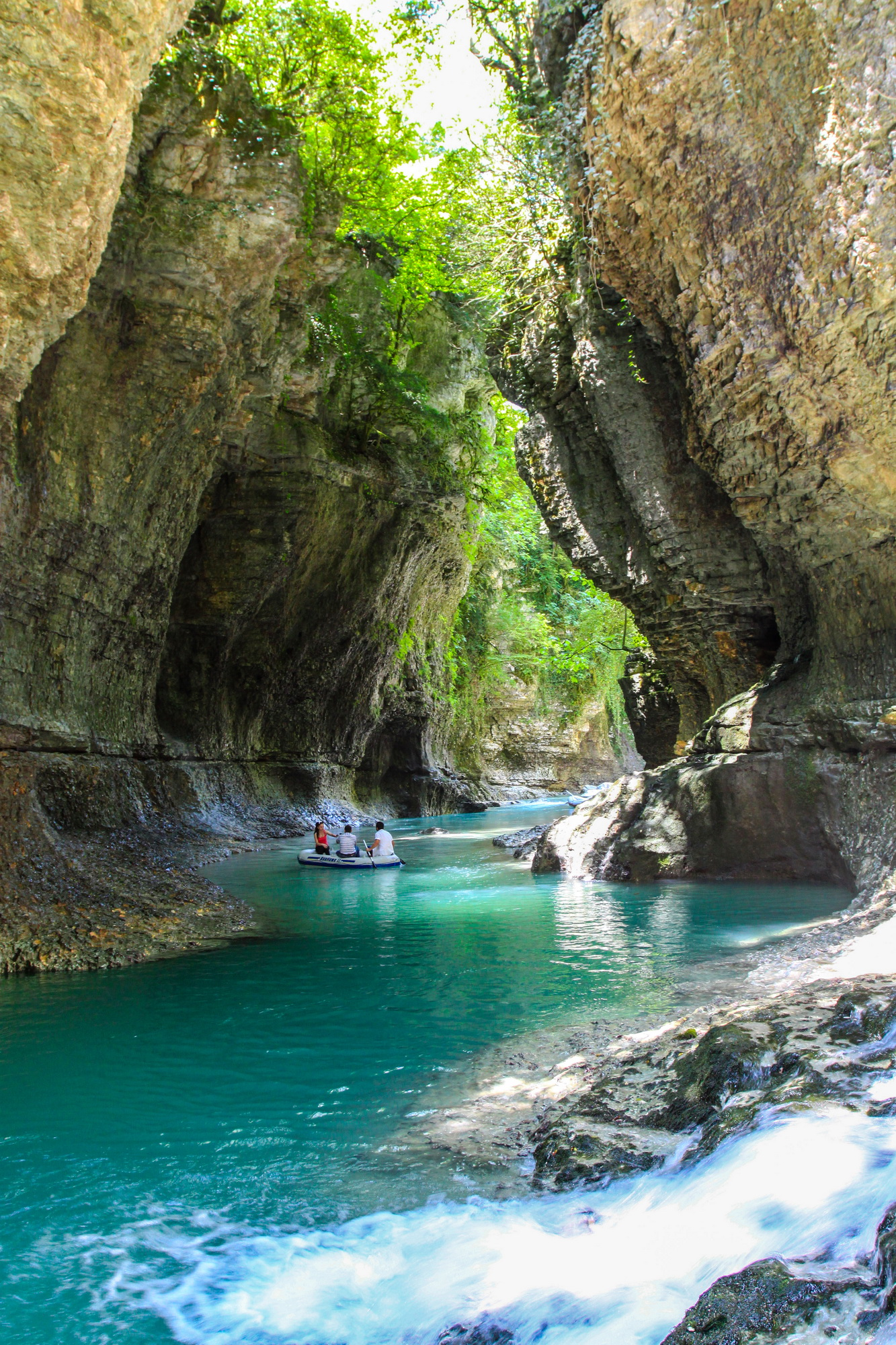 მარტვილის კანიონის ბუნების ძეგლი. ღირსშესანიშნაობა: ბუნების ძეგლი წარმოადგენს მდინარე აბაშის მიერ აბდათის კირქვული ქანებით აგებულ ანტიკლინში, კანიონისებურად გაჭრილ ხეობას. კანიონის სიგრძე 2400 მ-ია, ჩაჭრის სიღრმე 20-30 მ, ხოლო სიგანე 5-10 მ. კანიონში ორ ადგილას არის შენახული კირქვის ბუნებრივი ხიდები, რაც იმის მანიშნებელია, რომ აქ ოდესღაც კარსტული მღვიმე ჩამოიშალა. გარდა ამისა, კანიონის შუა წელში წარმოიშობა 12-15 მ სიმაღლის ვარდნის მცირე ჩანჩქერები. ერთი მონაკვეთი გამოირჩევა განსაკუთრებული სილამაზით. ეს არის ოფუცხოლე, რომელიც ცნობილია “დადიანების საბანაოს” სახელით. აქ ჩასასვლეად ბილიკი კირქვის დიდი კვადრებისგან აშენებული კიბეს ჩაუყვება. გადმოცემის თანახმად, სწორედ ამ კიბით დადიოდნენ გიორგი ჭყონდიდელი და დავით აღმაშენებელი. მიმდებარე კირქვოვან კლდეებზე განვითარებულია კოლხური ტყისთვის დამახასიათებელი ფლორა, თავისი უნიკალური წარმომადგენლებით, აქ გვხვდება: დათვის თხილი, კოლხური ბზა, უთხოვარი და სხვა. მრავლადაა სხვადასხვა სახეობის ხავსი, გვიმრანაირები. მდებარეობა: მარტვილის მუნიციპალიტეტი, სოფ. გაჭედილი, მდ. აბაშის ხეობა, მარტვილი-ჩხოროწყუს ცენტრალური საავტომობილო გზის პირას, 210 მეტრი ზღვის დონიდან. კოორდინატები: N42 27.394 E42 22.557 მისასვლელი გზა: ბუნების ძეგლთან ყველაზე ახლომდებარე მსხვილი დასახლებული პუნქტია ქ. მარტვილი. თბილისიდან მარტვილი დაშორებულია 280 კმ-ით; ხანგრძლივობა - 4 სთ; ქ. მარტვილიდან - გოჭკადილის კანიონის ბუნების ძეგლი - 5,5 კმ; ხანგრძლივობა - 10 წთ